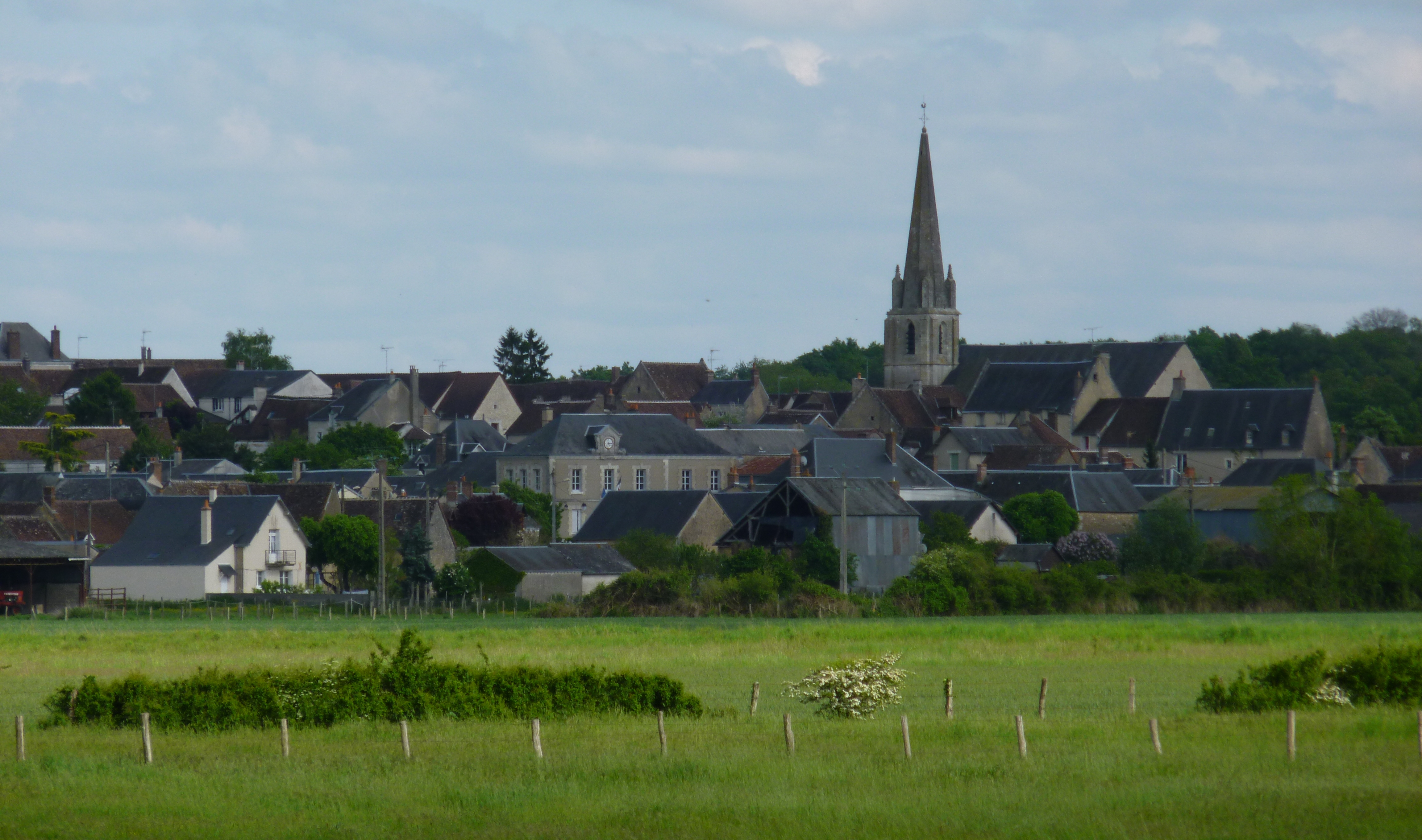 Thoré-la-Rochette, vue de la D 82